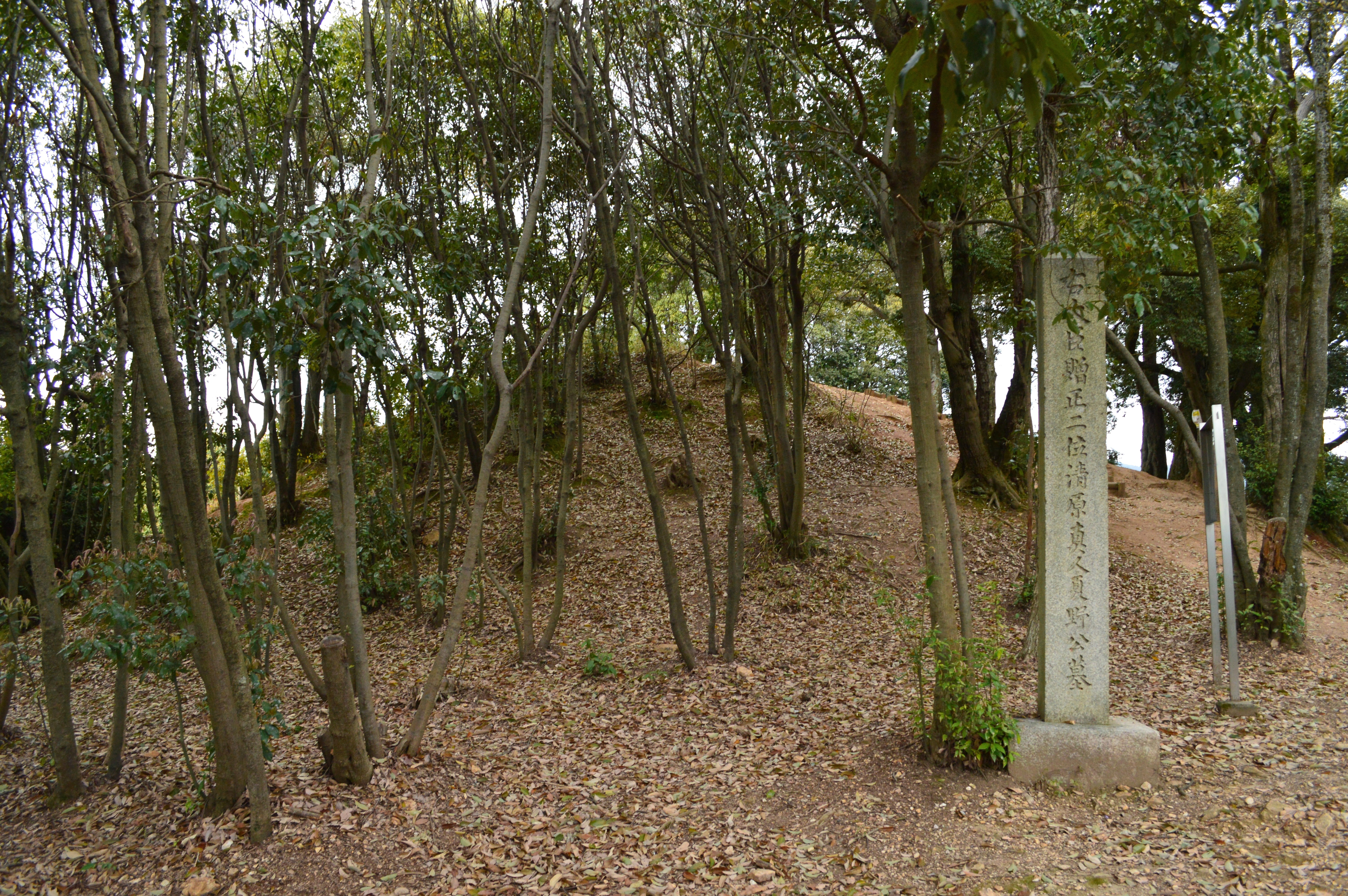 双ヶ岡1号墳 全景